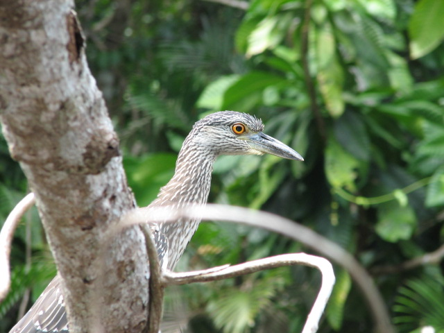 Imagen de un Nyctanassa violacea en el Refugio de Vida Silvestre de Cuero y Salado en la Ceiba, Honduras.